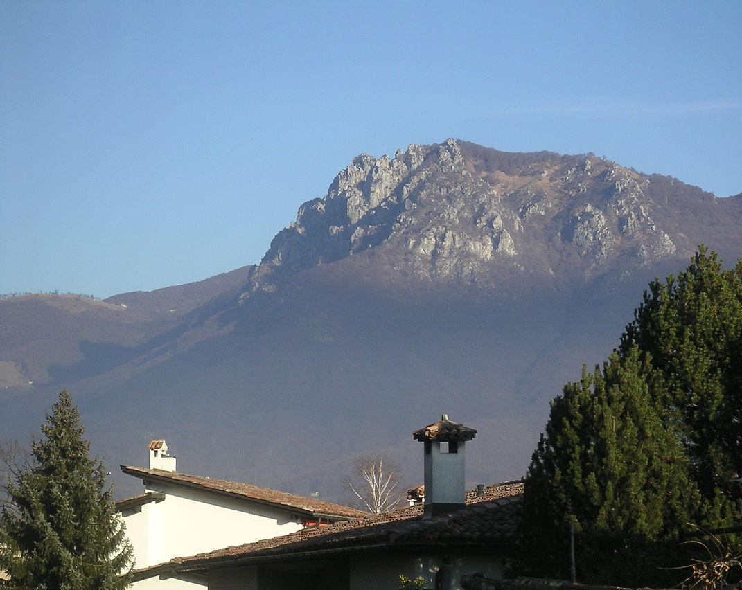 Blick auf die Denti della Vecchia aus dem Dorf Comano